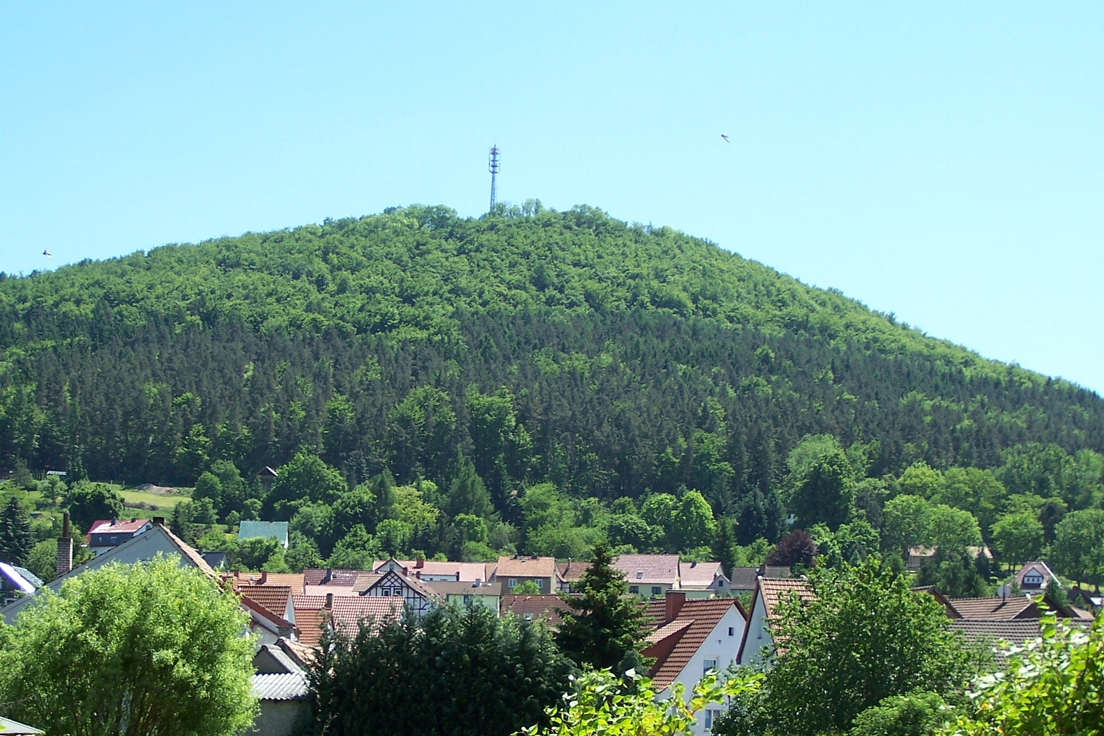 Teilansicht des Ortes Kieselbach von Norden, im Hintergrund der Krayenberg.